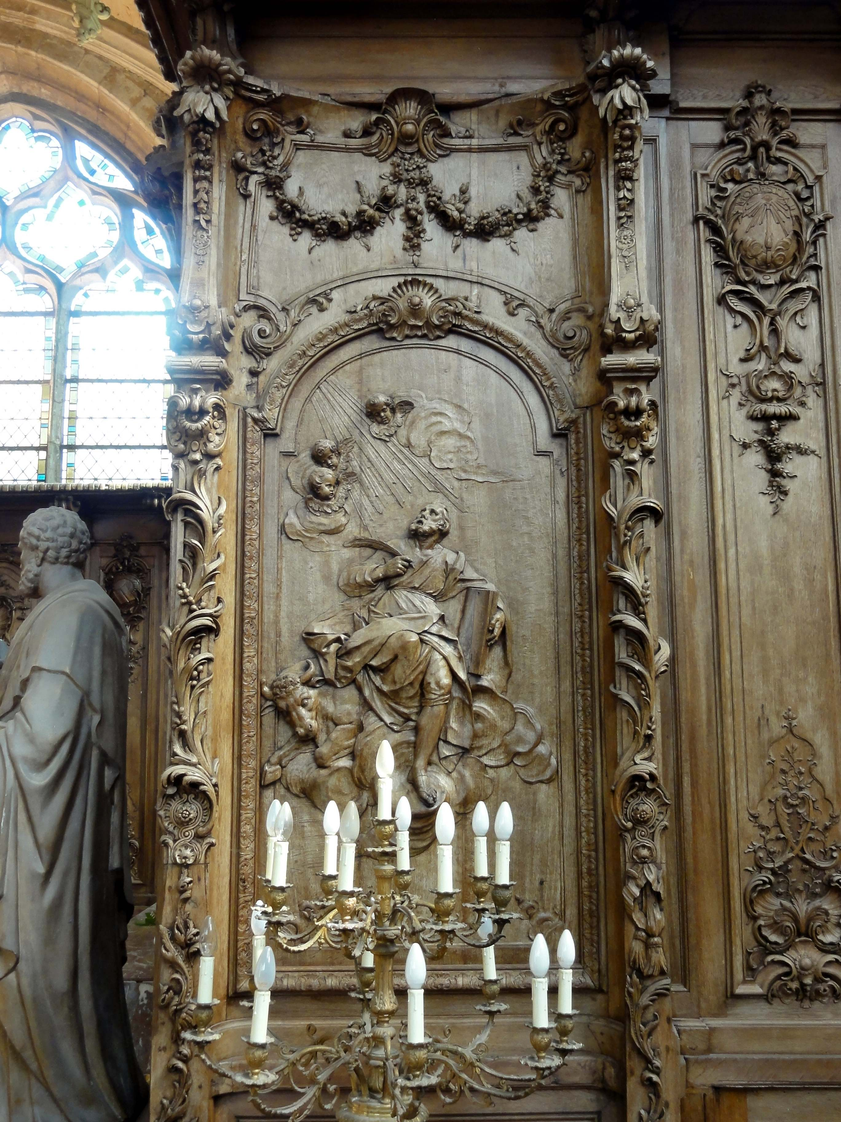 Boiseries provenant de l'abbaye de Chaalis (voir titre).